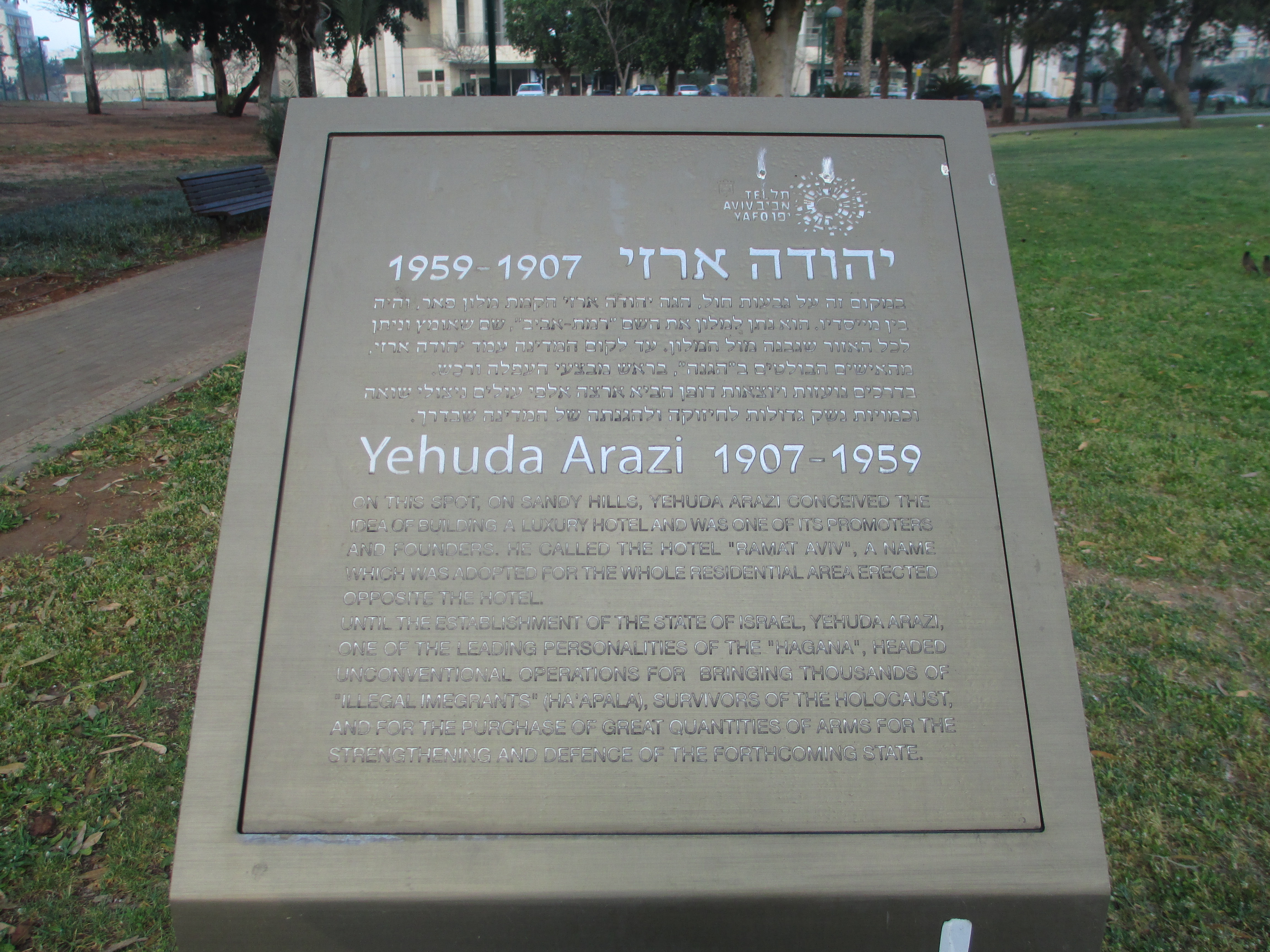 לוח זיכרון ליהודה ארזי במקום בו עמד מלון רמת אביב בתל אביב